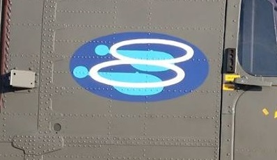 Lufttransportstaffel8 Abzeichen